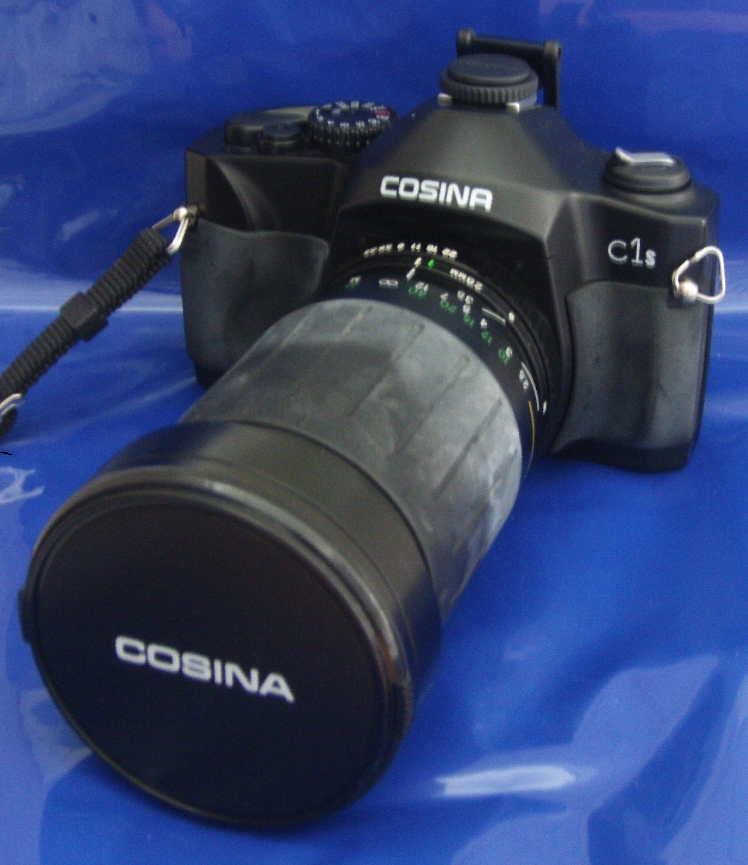 コシナの35㎜フィルム一眼レフカメラ「C1s」 レンズも自社製